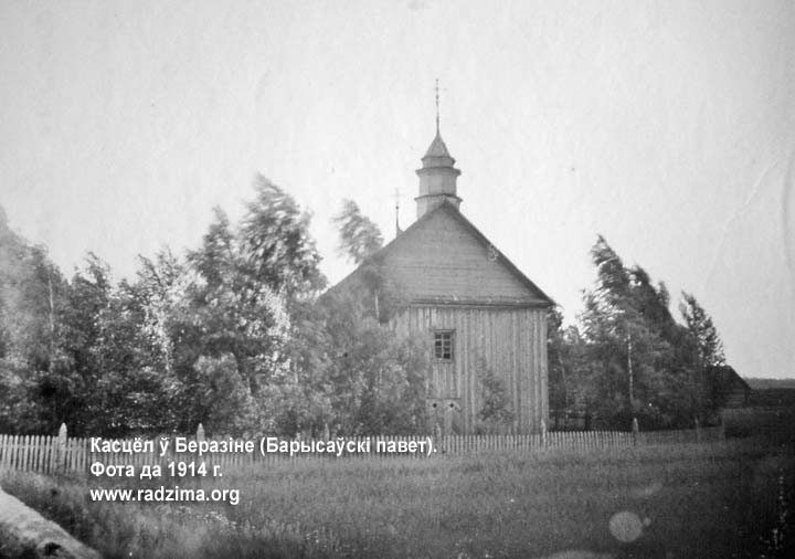 Беларуская (тарашкевіца): Бярэзань Горная (Biarezań Hornaja). Касьцёл